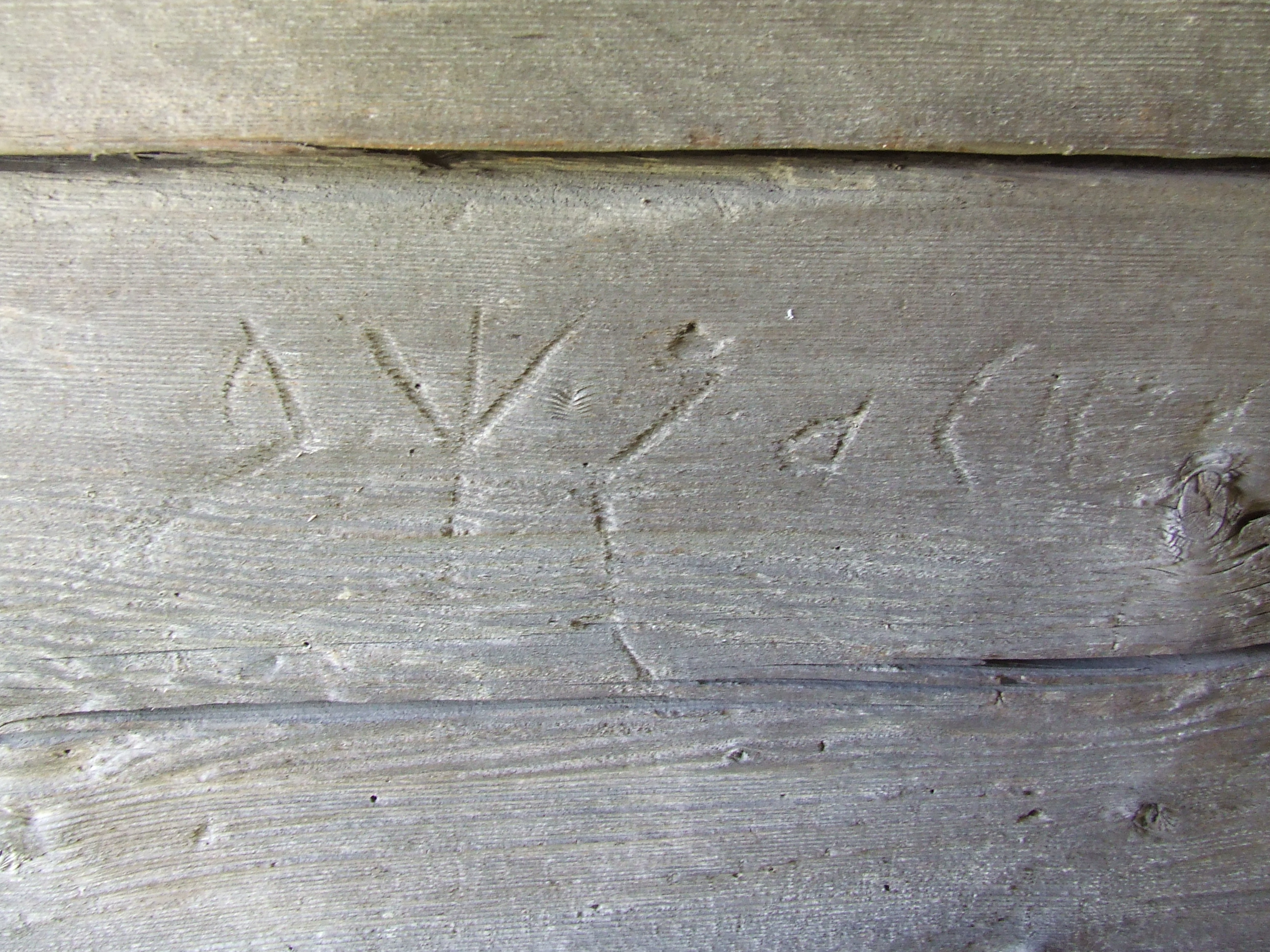 Biserica de lemn din Nadăşa, judeţul Mureş. Inscripţie din prispa bisericii.